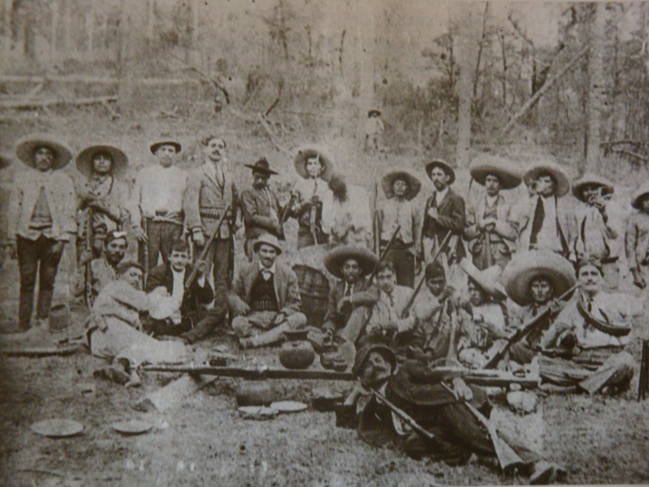 Grupo de revolucionarios tabasqueños.